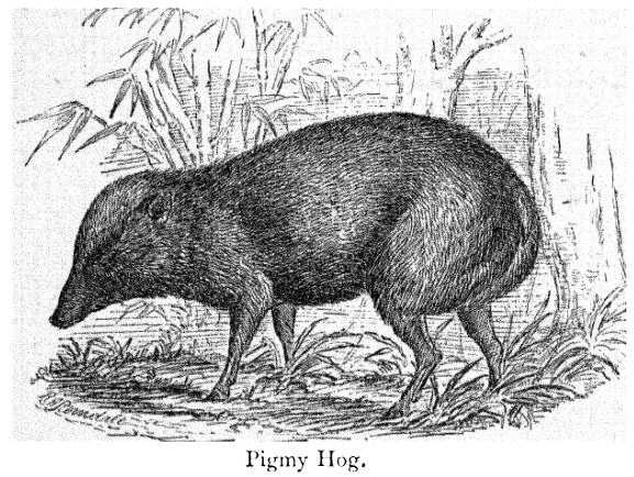 Porcula salvania, Pygmy Hog